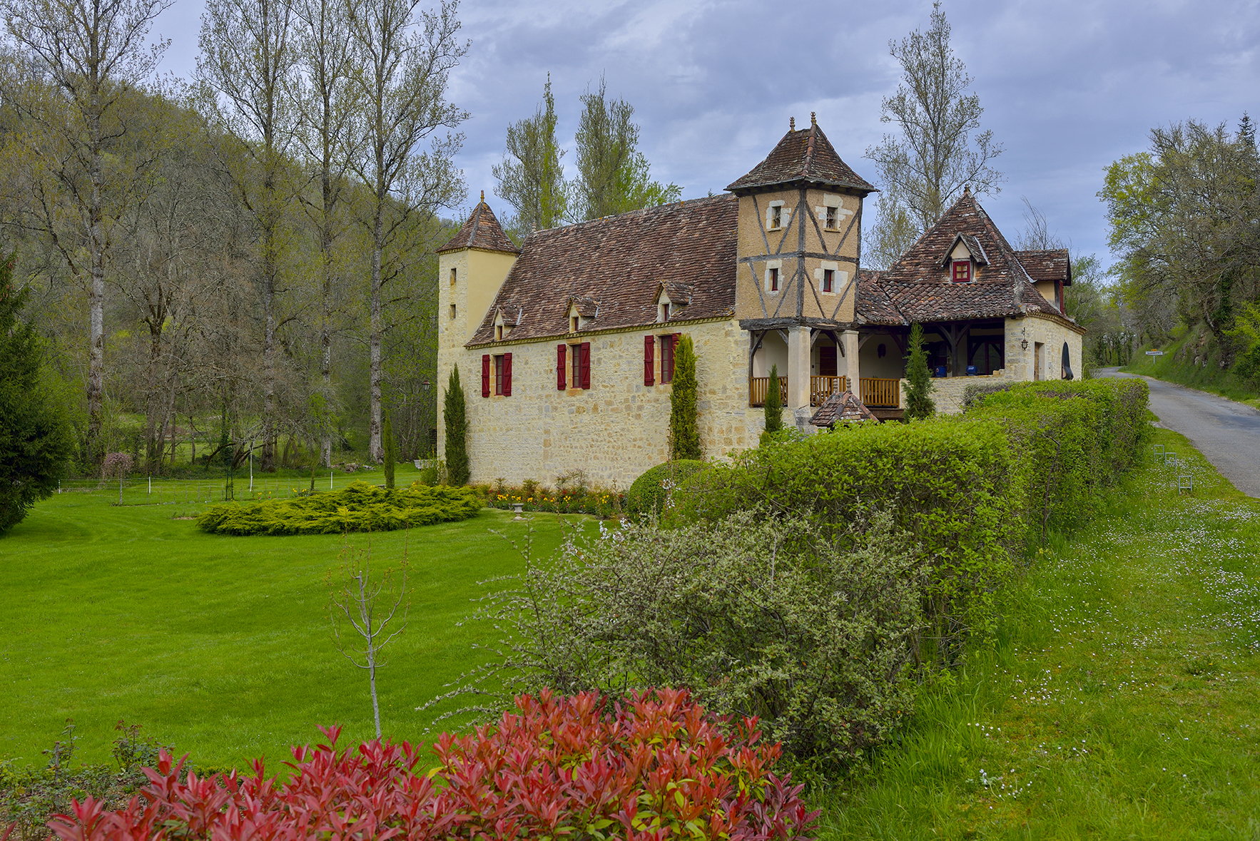 La maison aux pigeonniers, commune de Gigouzac, Lot, France, Europe.